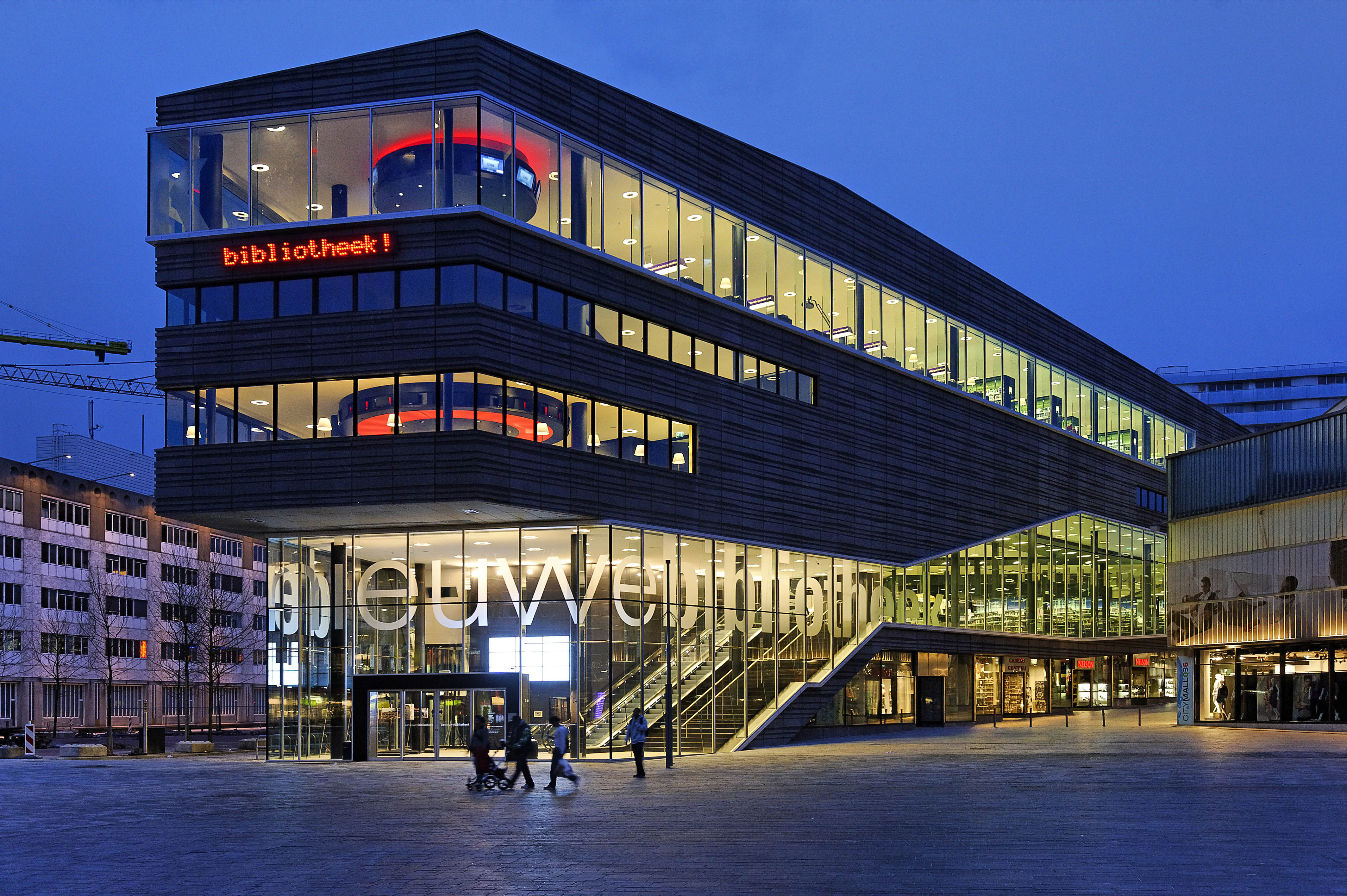 de nieuwe bibliotheek in Almere. Buitenkant, nacht.